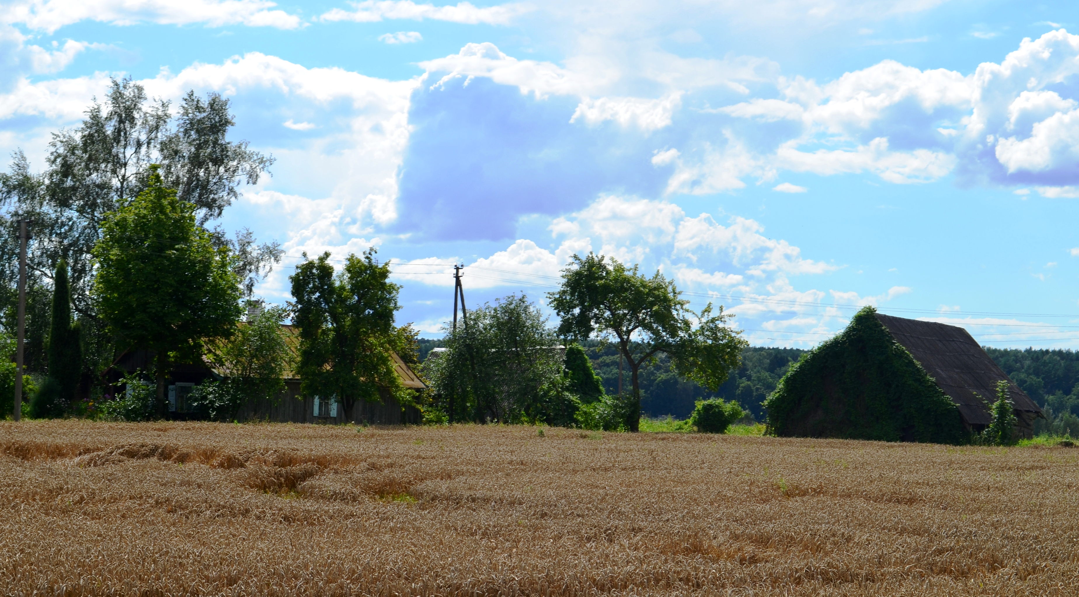 Galkantai, Kėdainių raj.